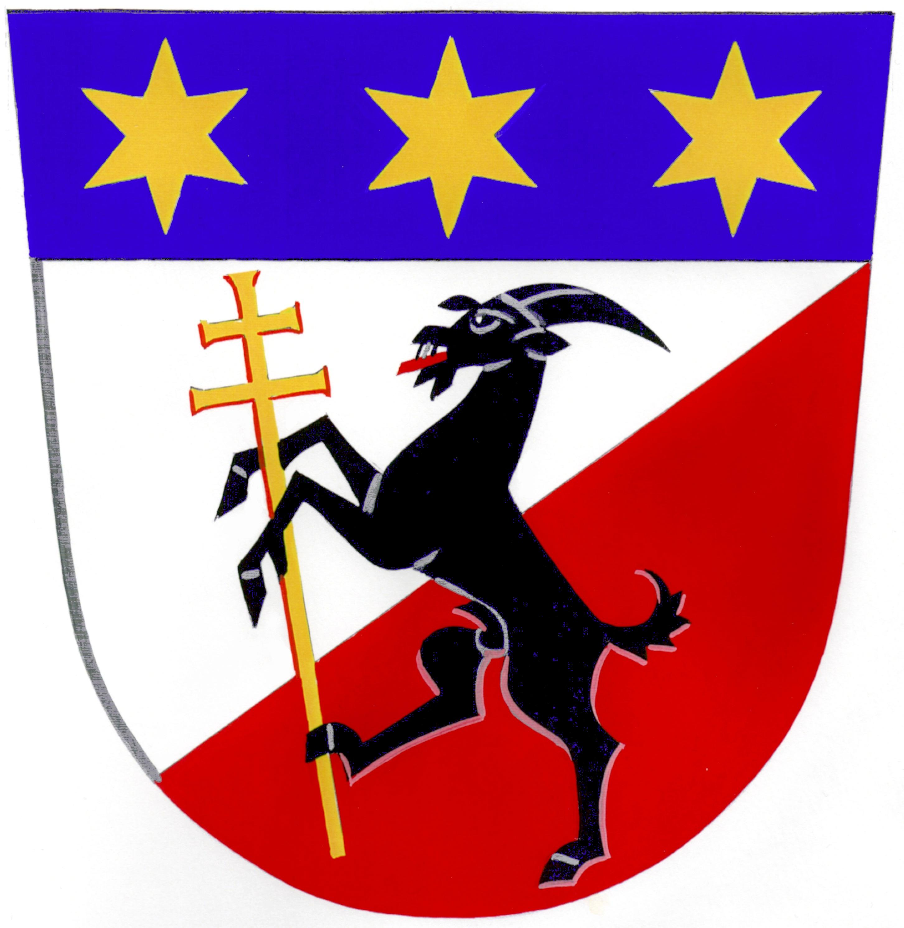 znak obce Rokytnice